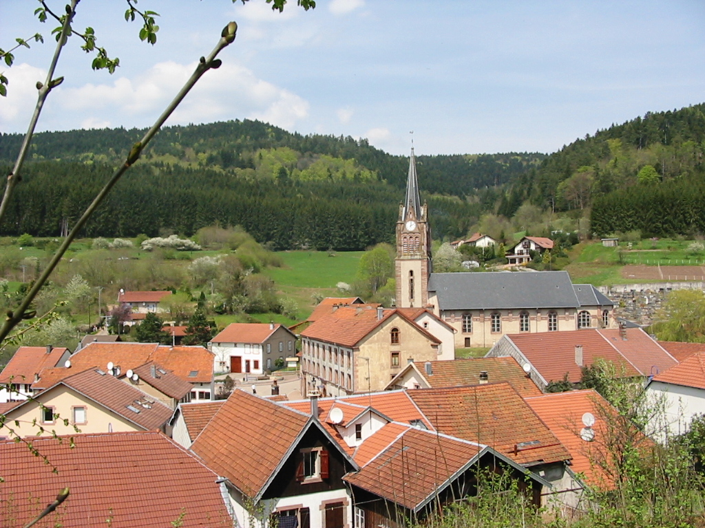 Wisembach Commune des Vosges Le Centre Photographie personnelle, prise le 3 mai 2006 Copyright © Christian Amet